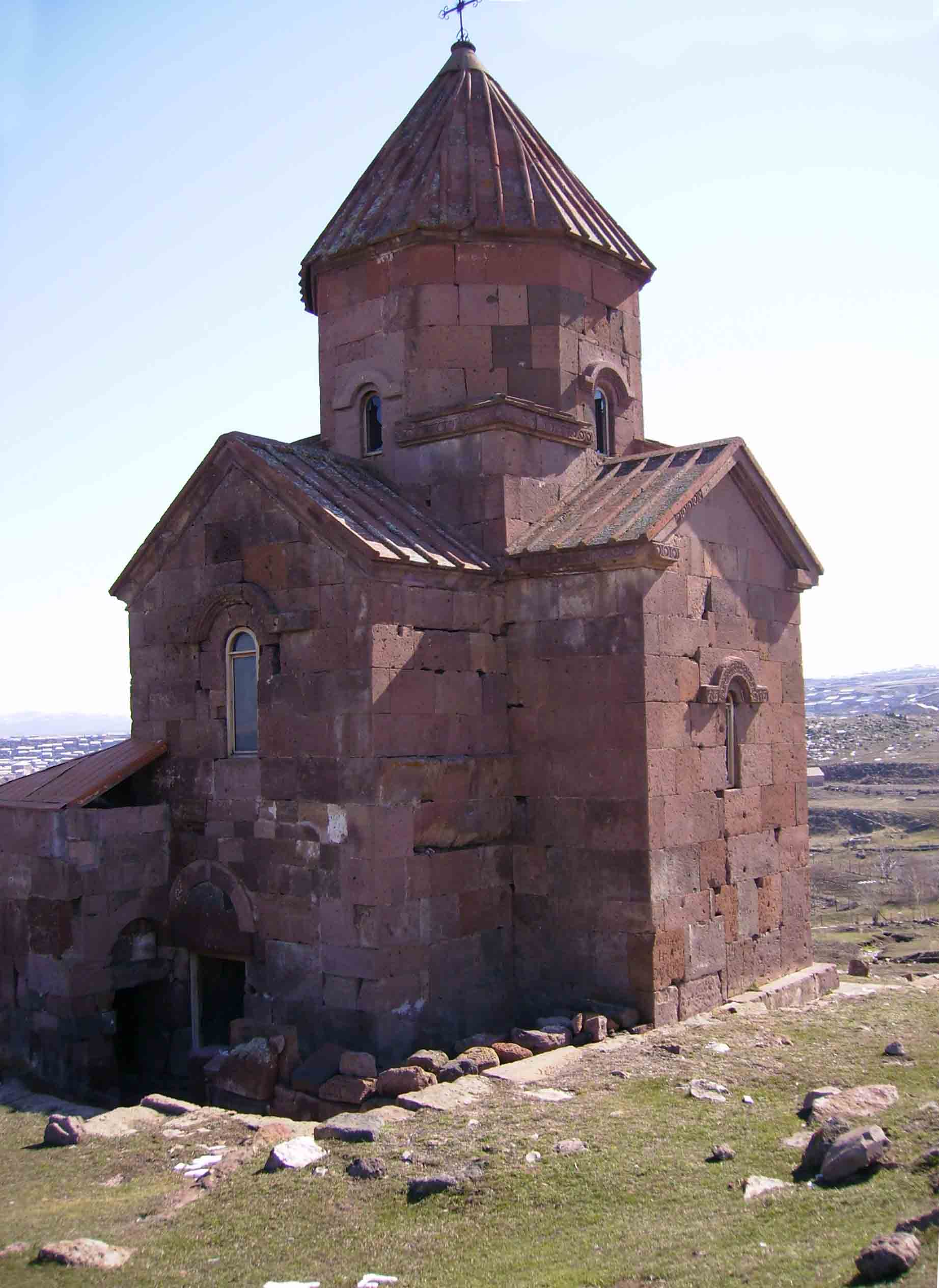 Monastère de la region de Shirak (Arménie)